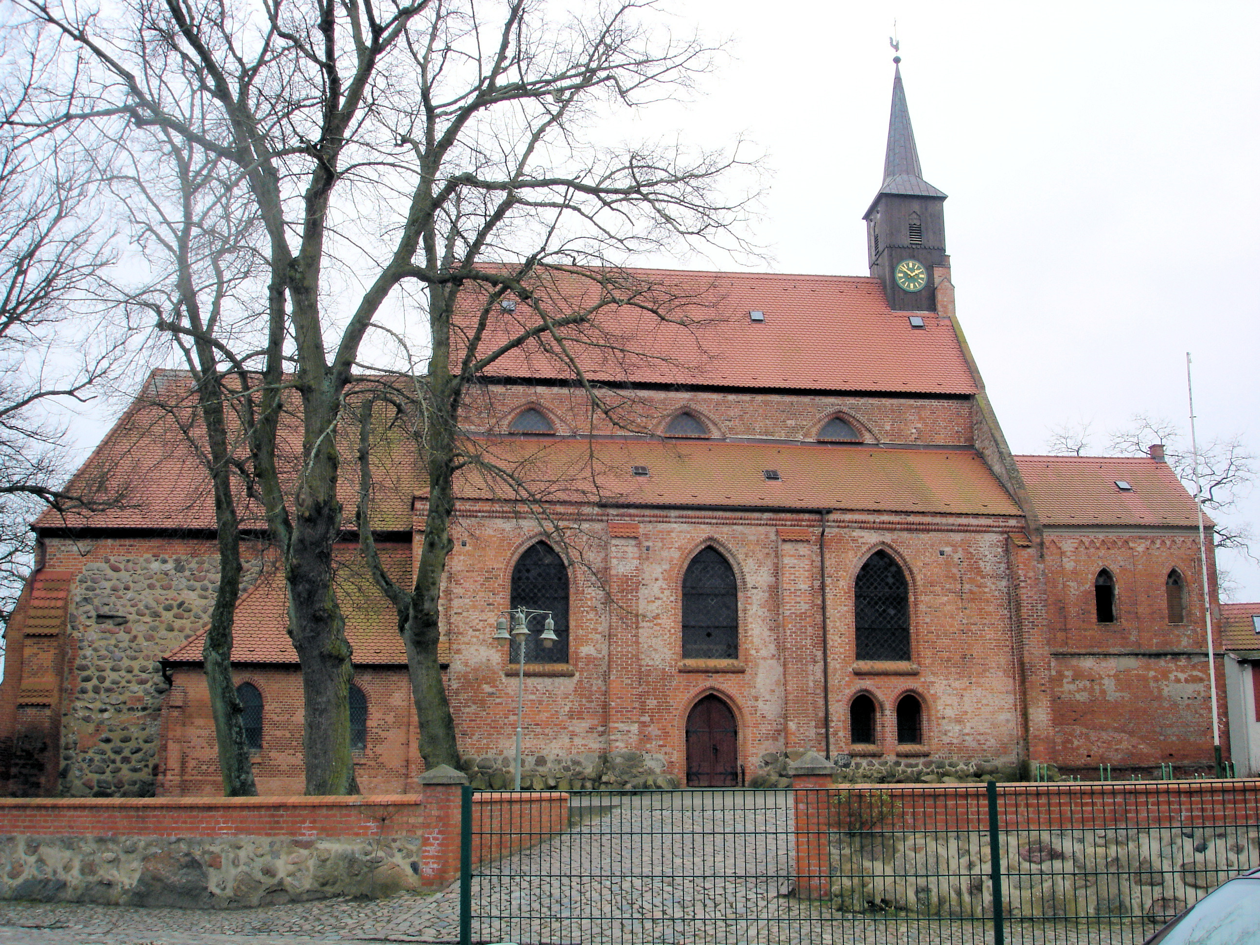 Kirche in Tessin (Mecklenburg) / Church in Tessin (Mecklenburg-Western Pomerania)